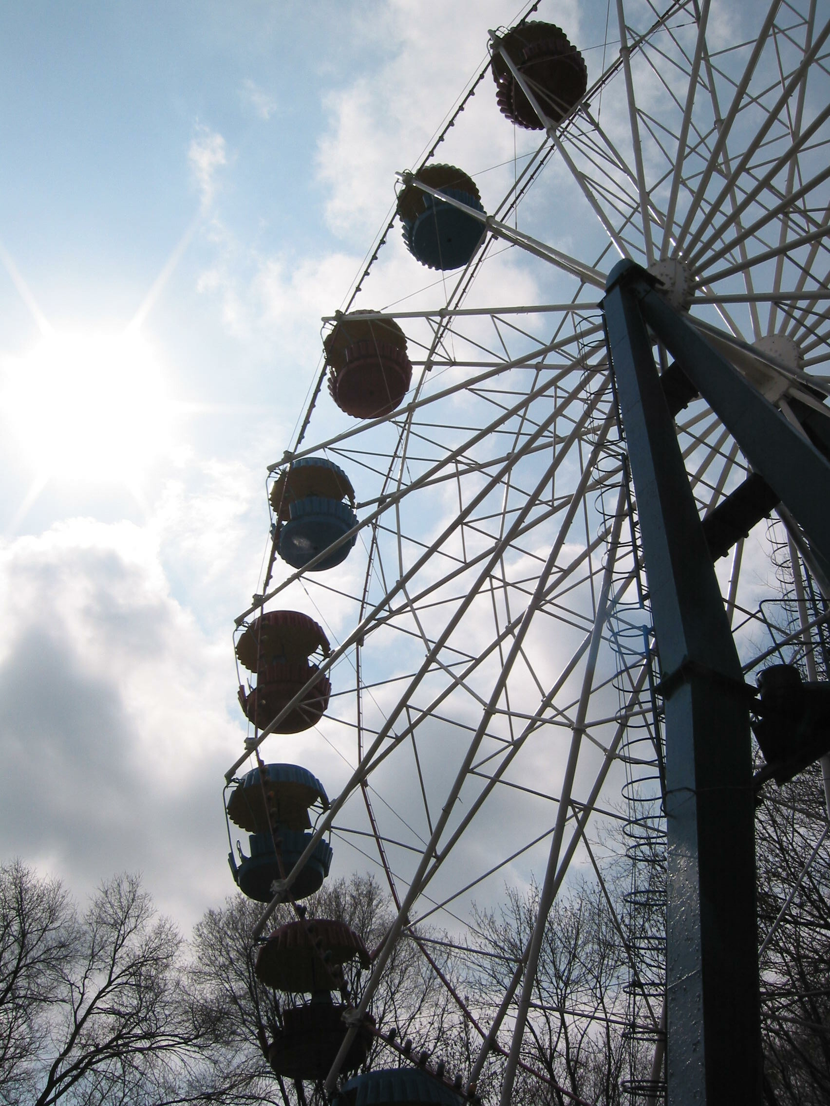 Парк Щербакова. Колесо обозрения